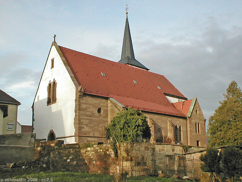 St.-Ulrichs-Kirche in Brackenheim-Stockheim, von Südwesten aus gesehen